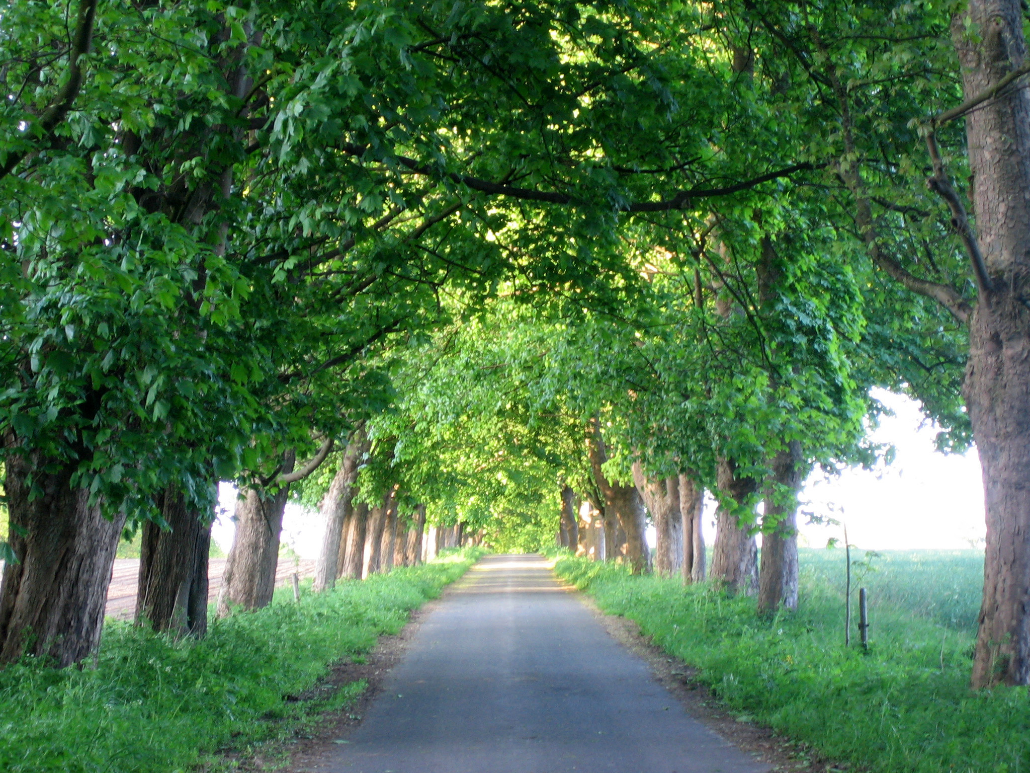 Ahorn-Allee Carl Ficke, Siedlung Weißenberg, Ortschaft Driftsethe in der Gemeinde Hagen im Bremischen, Landkreis Cuxhaven